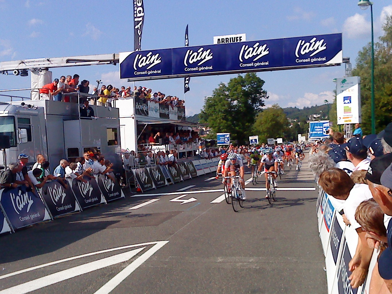 Arrivée du peloton lors de la 3e étape du Tour de l'Ain 2010. Victoire de Maxime Bouet après déclassement de Steve Morabito